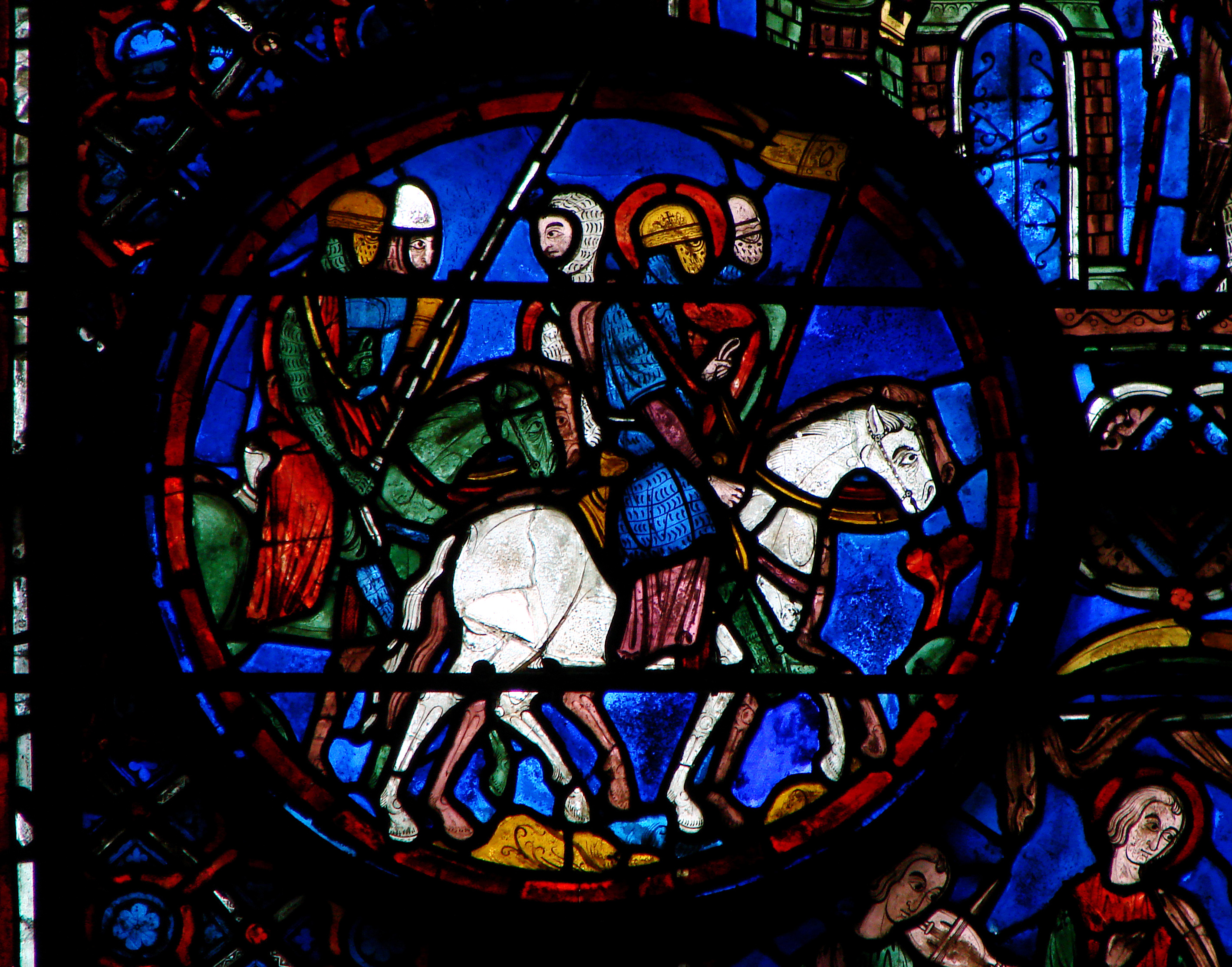 Détail d'un vitrail de la cathédrale Notre-Dame de Chartres.